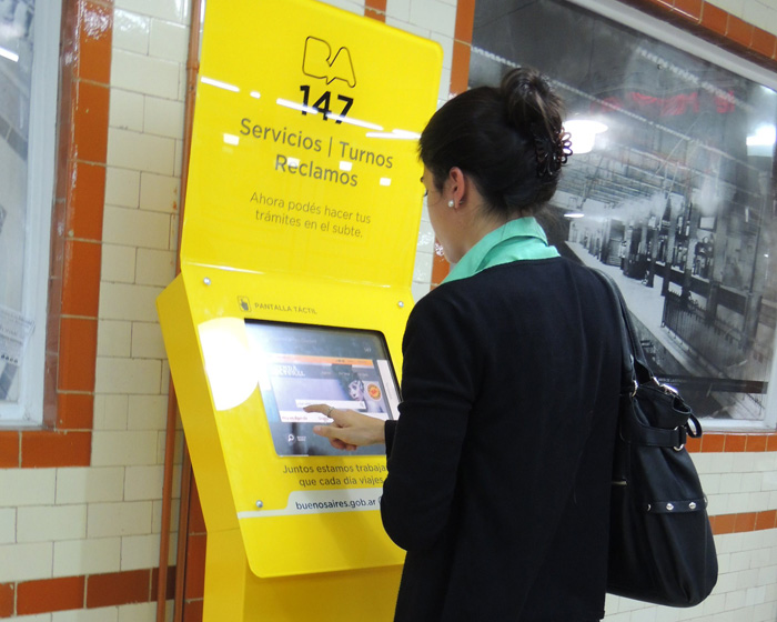 Terminal interactiva ubicada en la Línea A del subterráneo